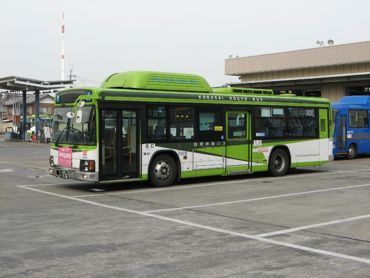 国際興業3908号車。国際興業西浦和営業所敷地外より撮影。CNGノンステップ車両。